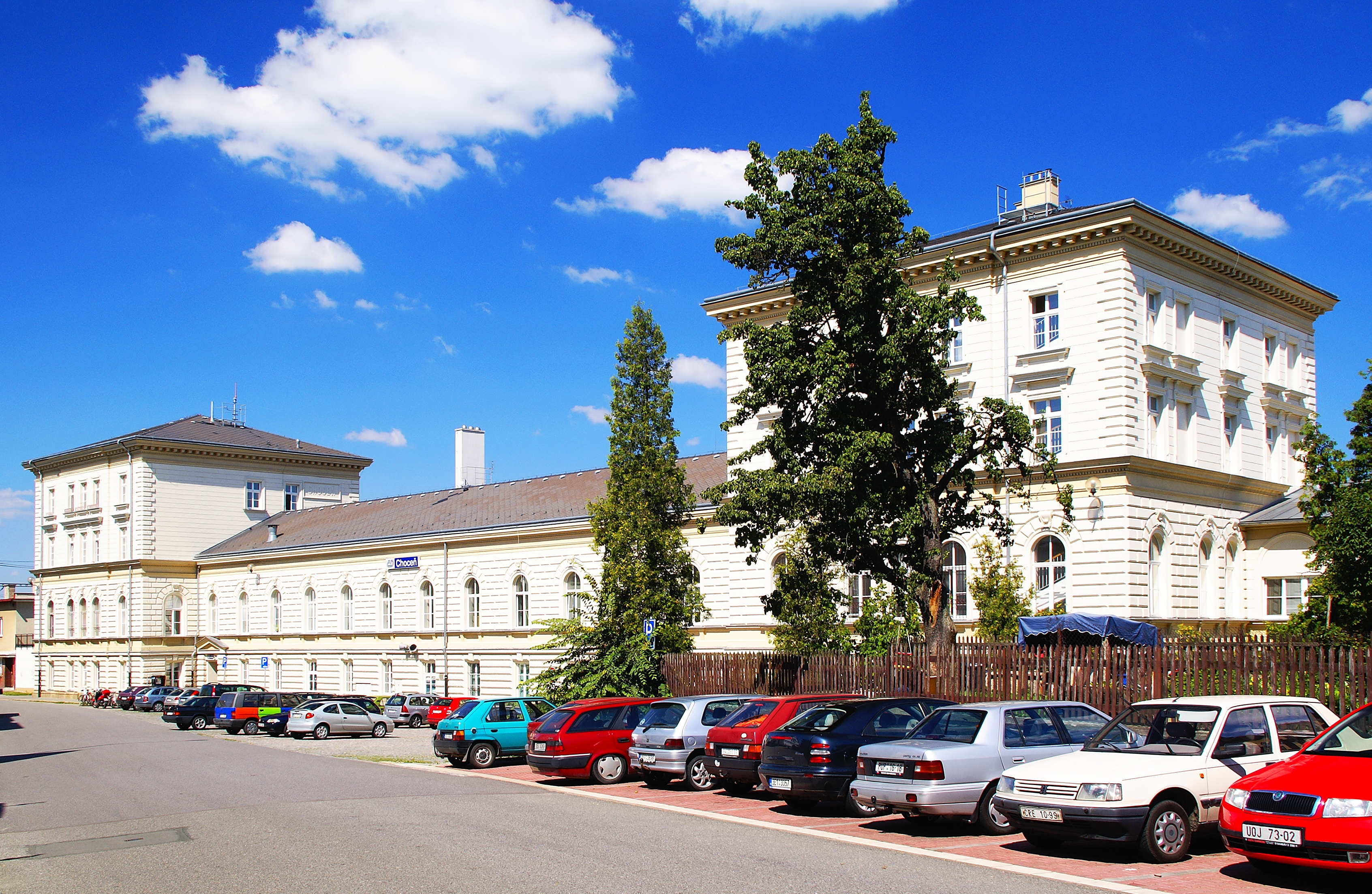 Nádražní budova železniční stanice v Chocni.